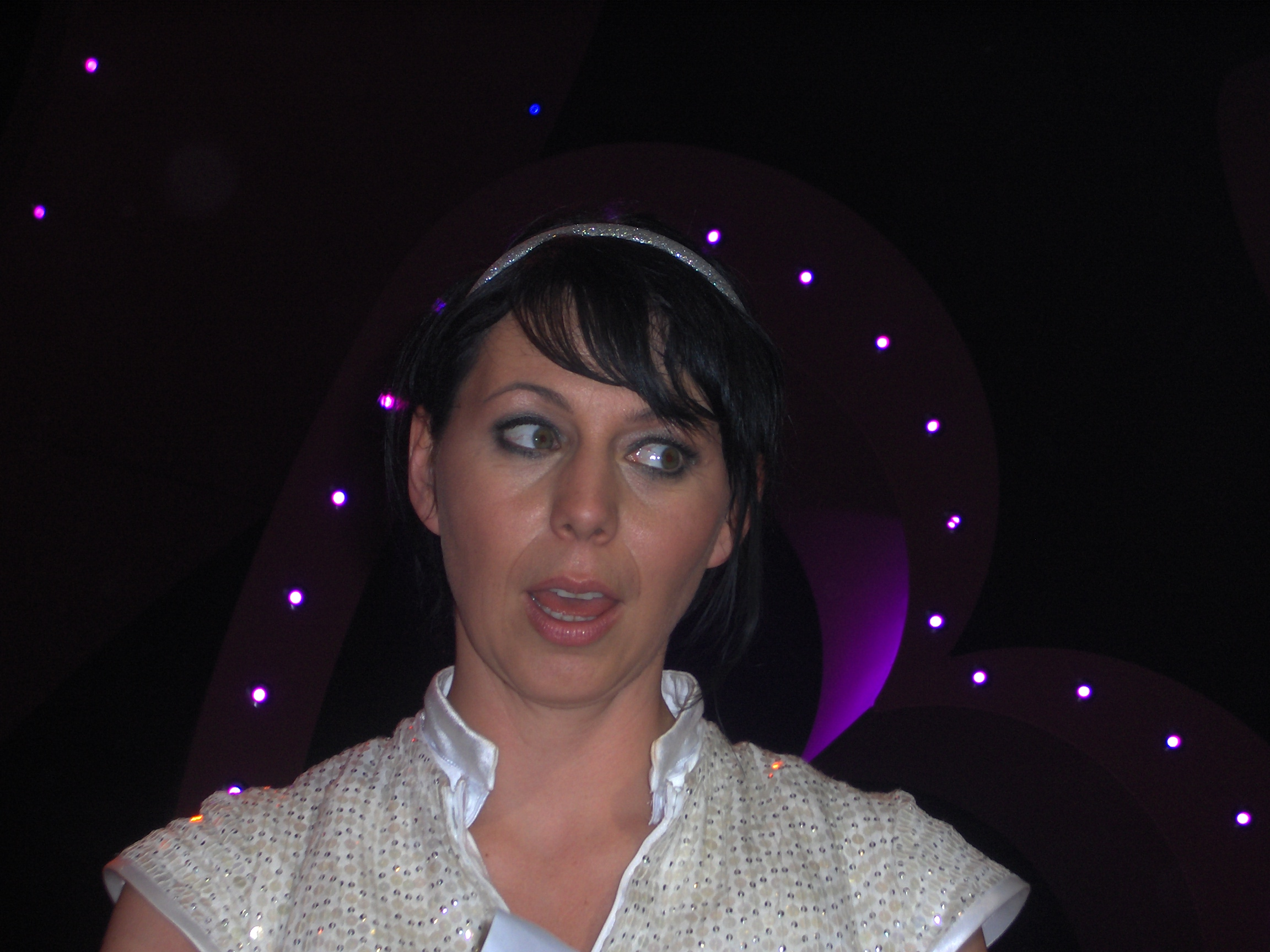 Kristel Verbeke, Belgian vocalist from K3